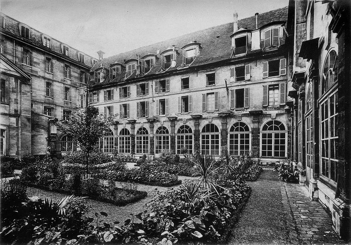 Préau du cloître de l'abbaye-aux-Bois, Paris, France